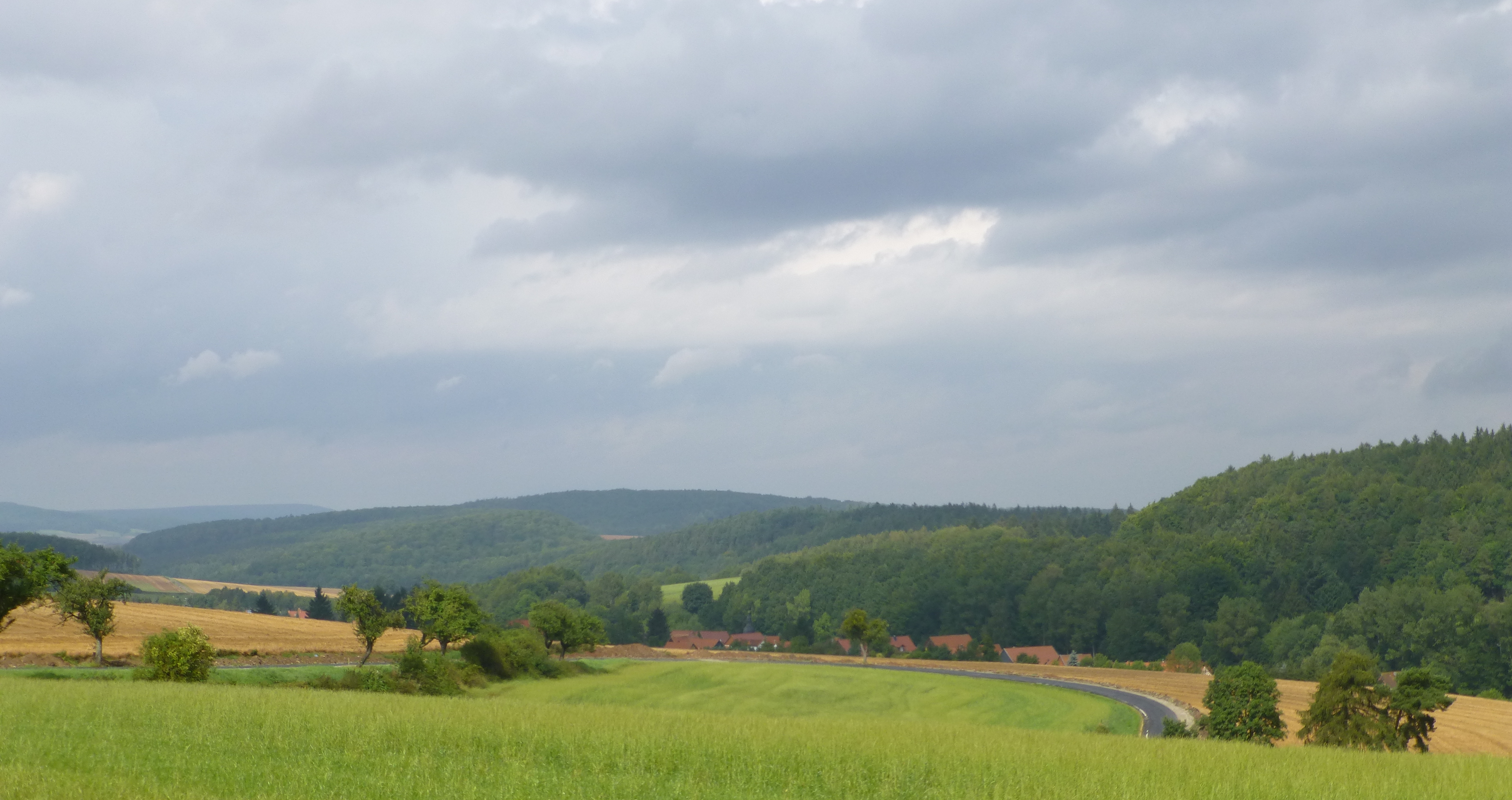 Blick von Südosten über Glasehausen auf den Silbergern, Rote Uferberg und links hinten ins obere Gartetal